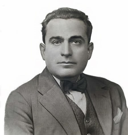 Archivo José Luis Jiménez